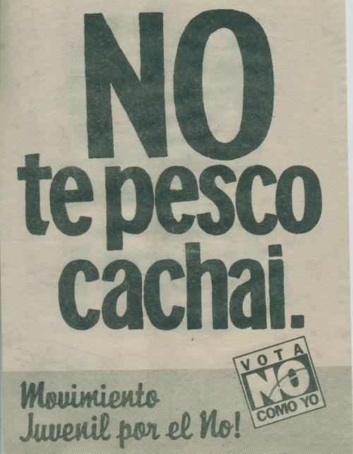 Panfleto de apoyo a la opción No en el plebiscito nacional de 1988 en Chile.